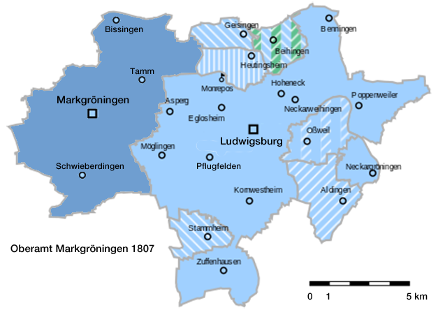 Oberamt Markgröningen 1807 Raumbezug: Württembergisches Oberamt Ludwigsburg in den Grenzen von 1813, nomineller Maßstab 1:100.000